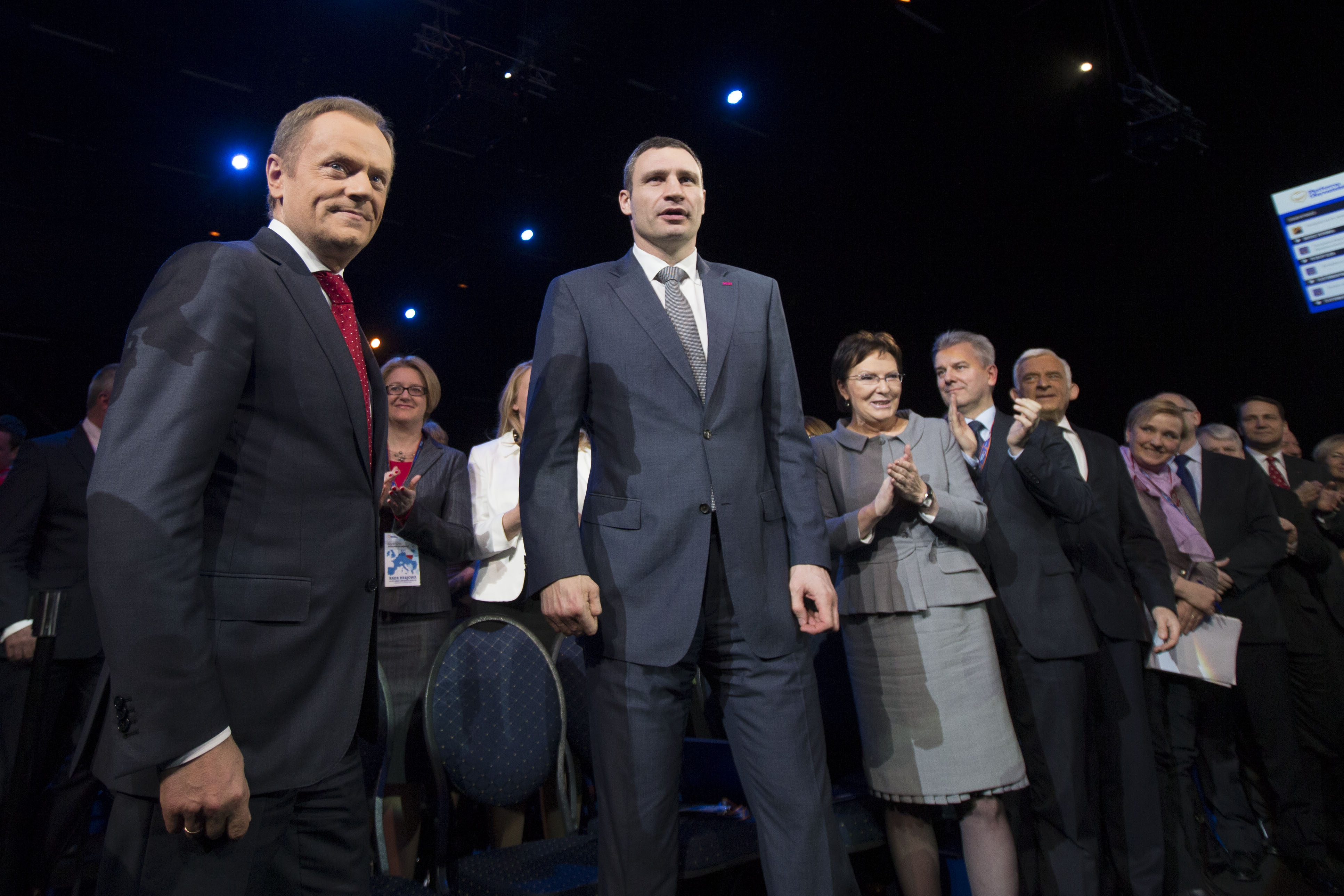 Rada Krajowa Platformy Obywatelskiej RP [22 marca 2014]